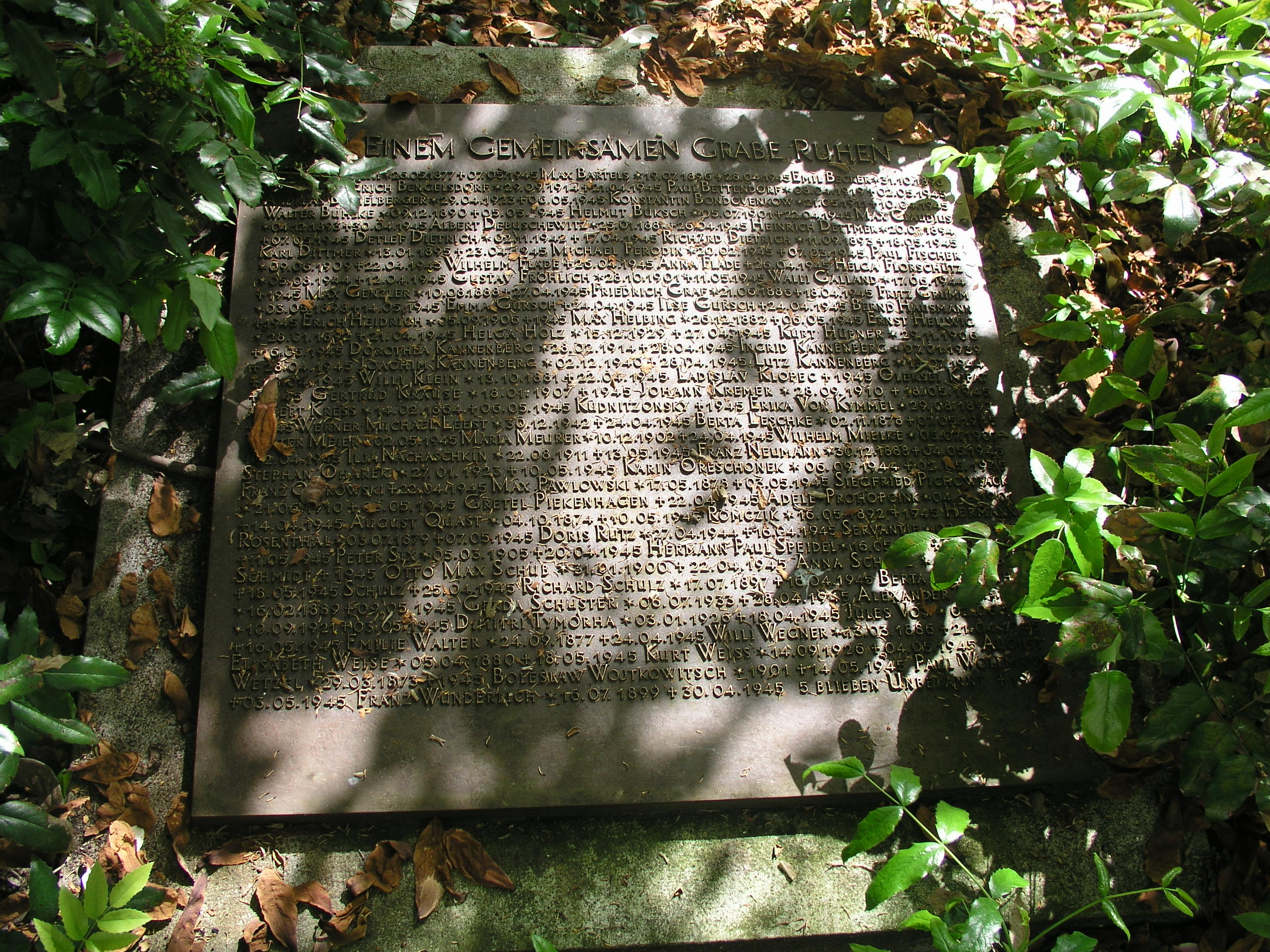 Gedenkstein über Massengrab für die Opfer eines Bombenabwurfs im Gelände des OZK